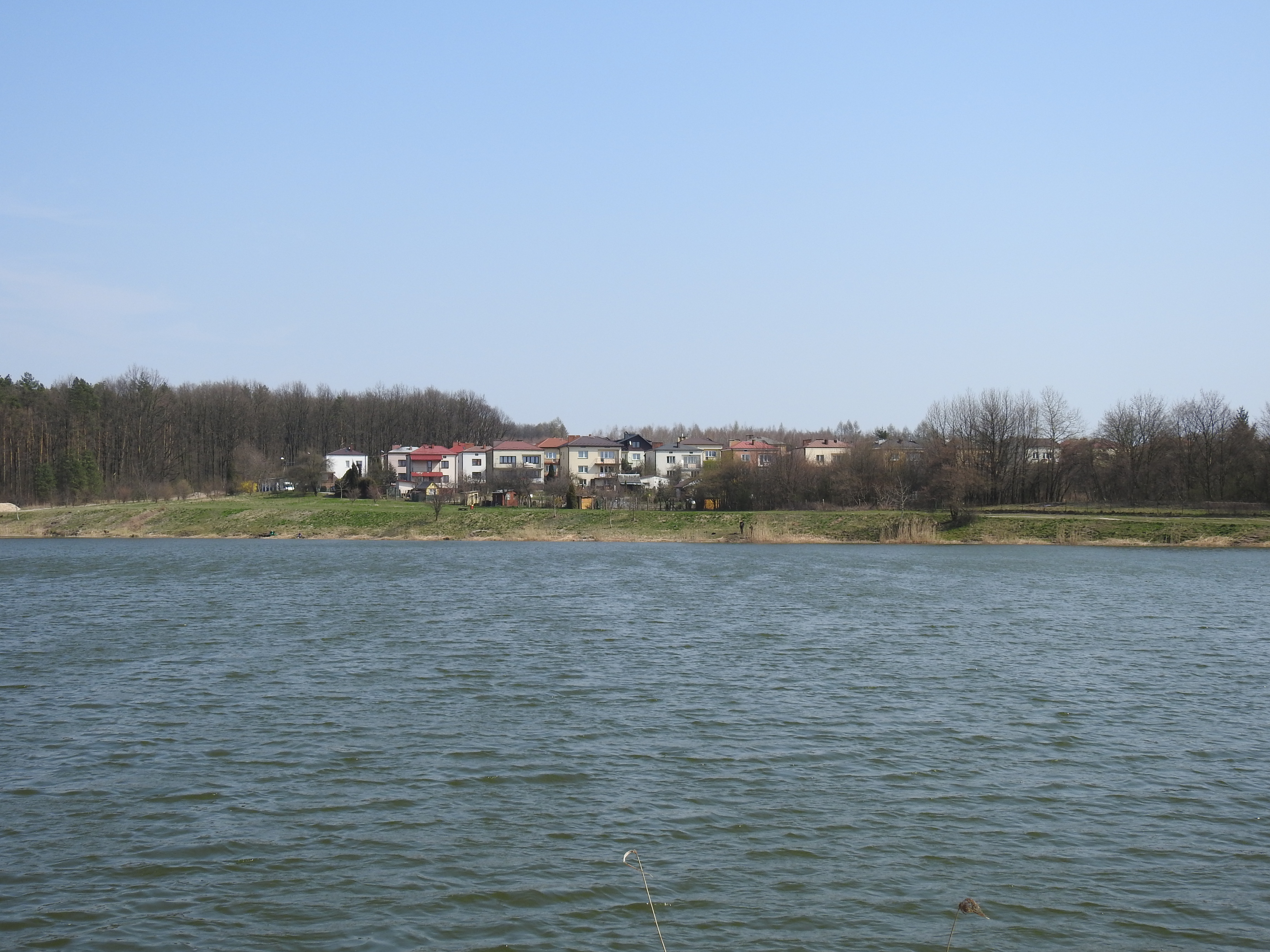 Osiedle Przylesie w Poniatowej